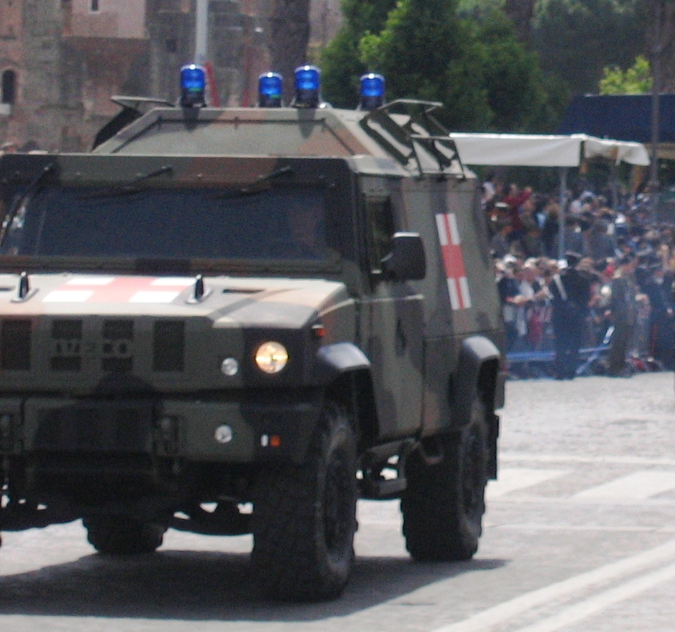 A Lince Iveco, ambulance version